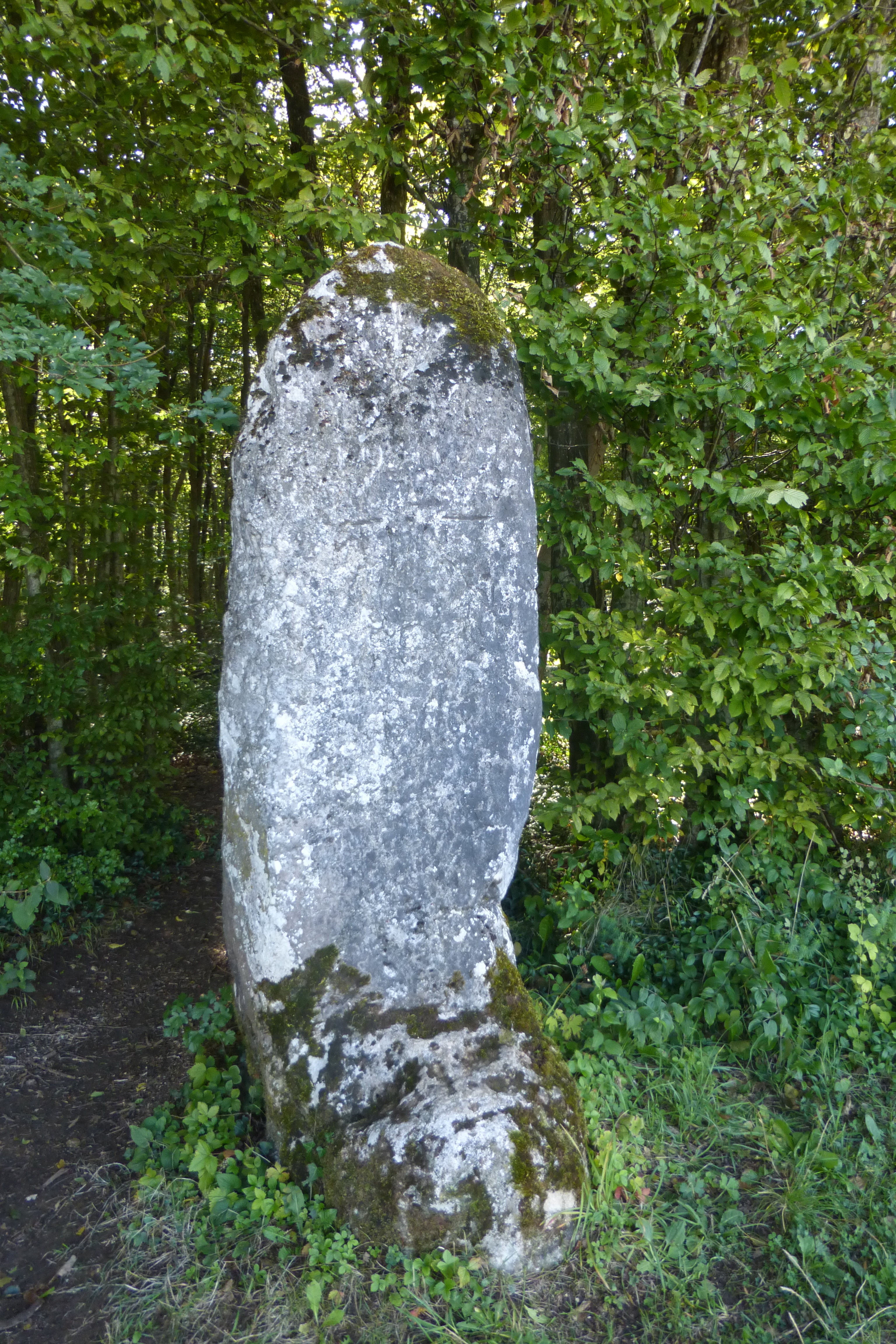 55 Saint-Mihiel, la Dame Schone, menhir